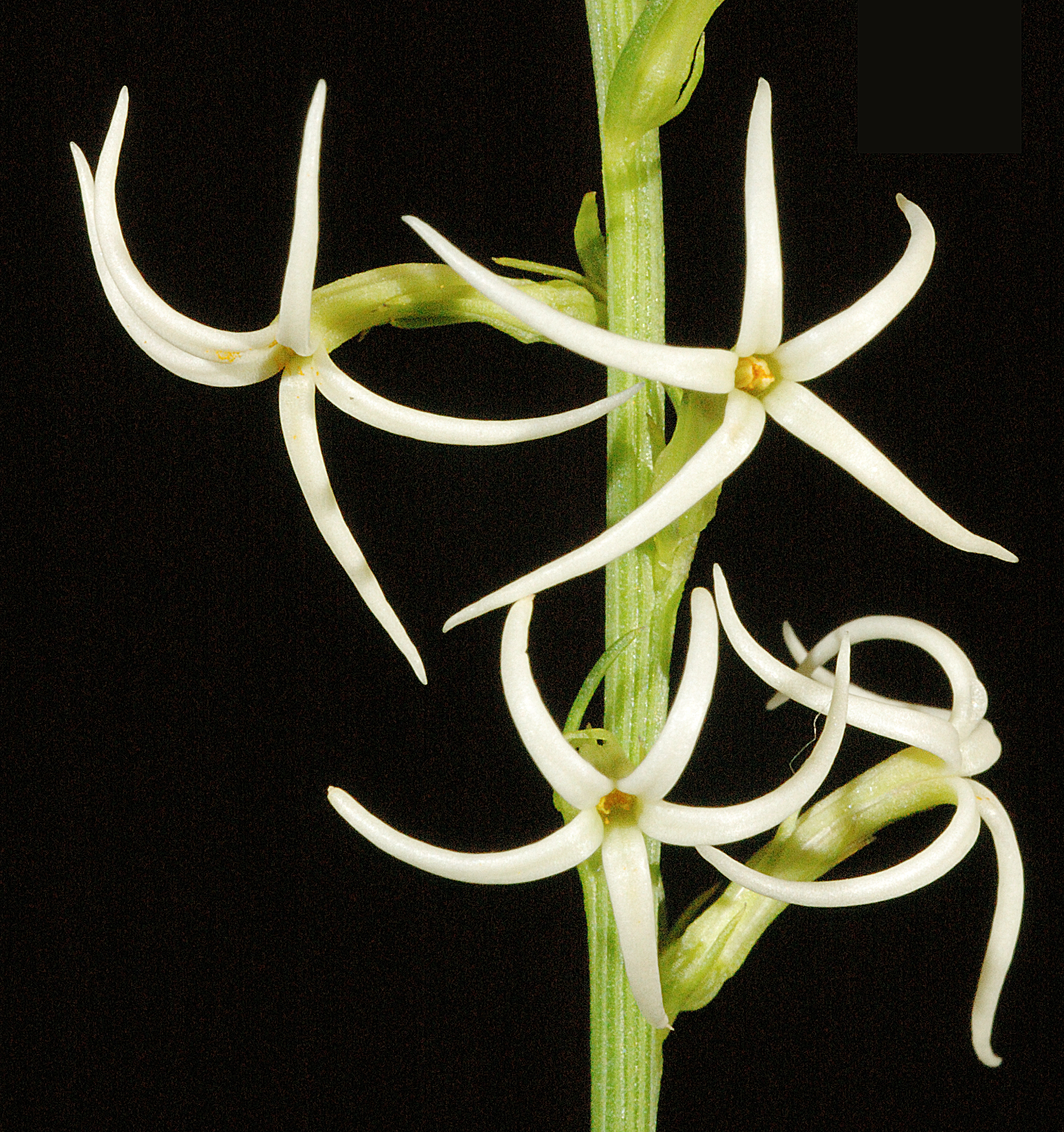 KRT3062